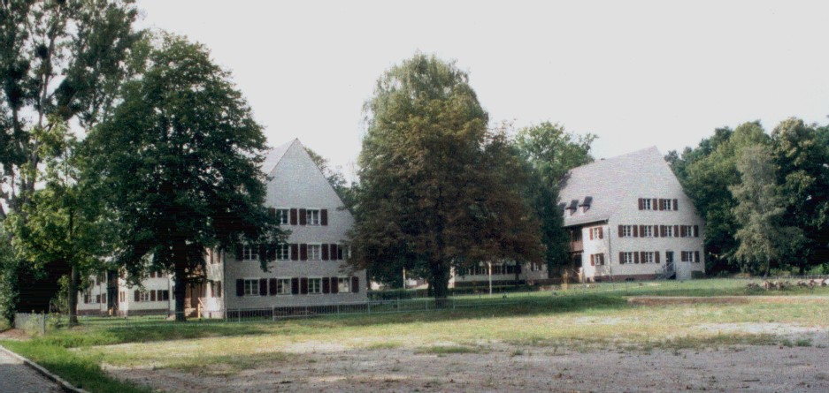 Mahn- und Gedenkstätte KZ Ravensbrück - Wohnsiedlung der SS-Wachmannschaft vor dem Lager